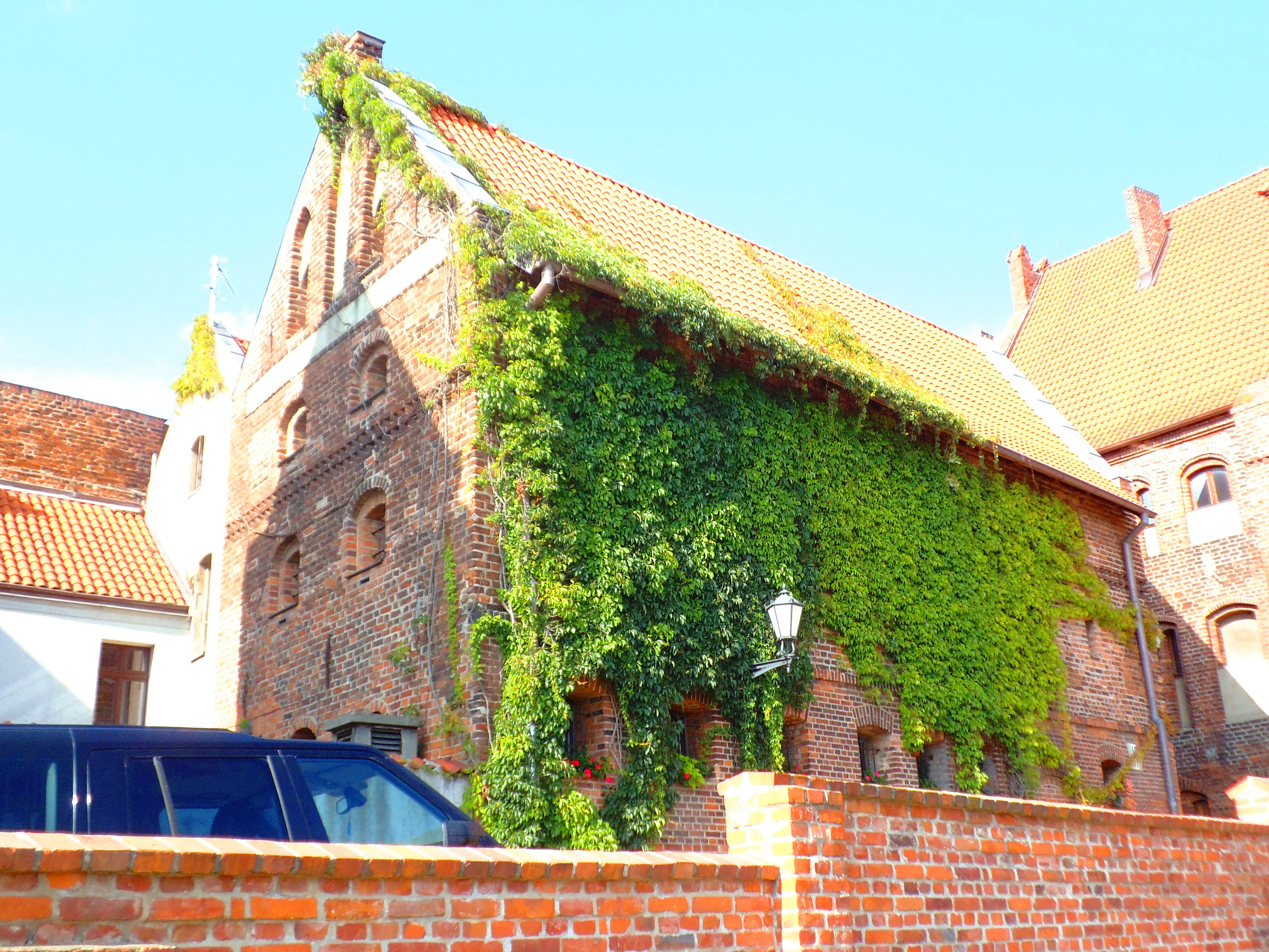 Dom Muz przy ul. Podmurnej w Toruniu